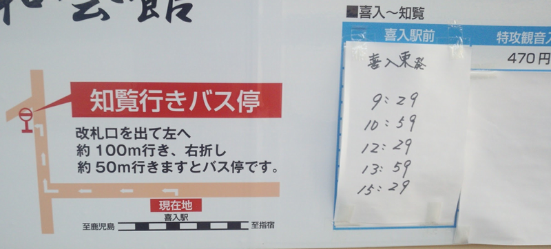 表示のバス（鹿児島交通）時刻は2017.10月改正のものです。